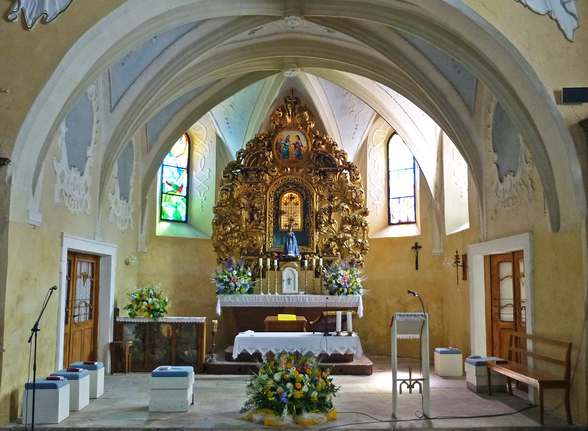 Altarraum der Wallfahrtskirche Mariä Heimsuchung in Quinau (Květnov) bei Komotau (Chomutov)